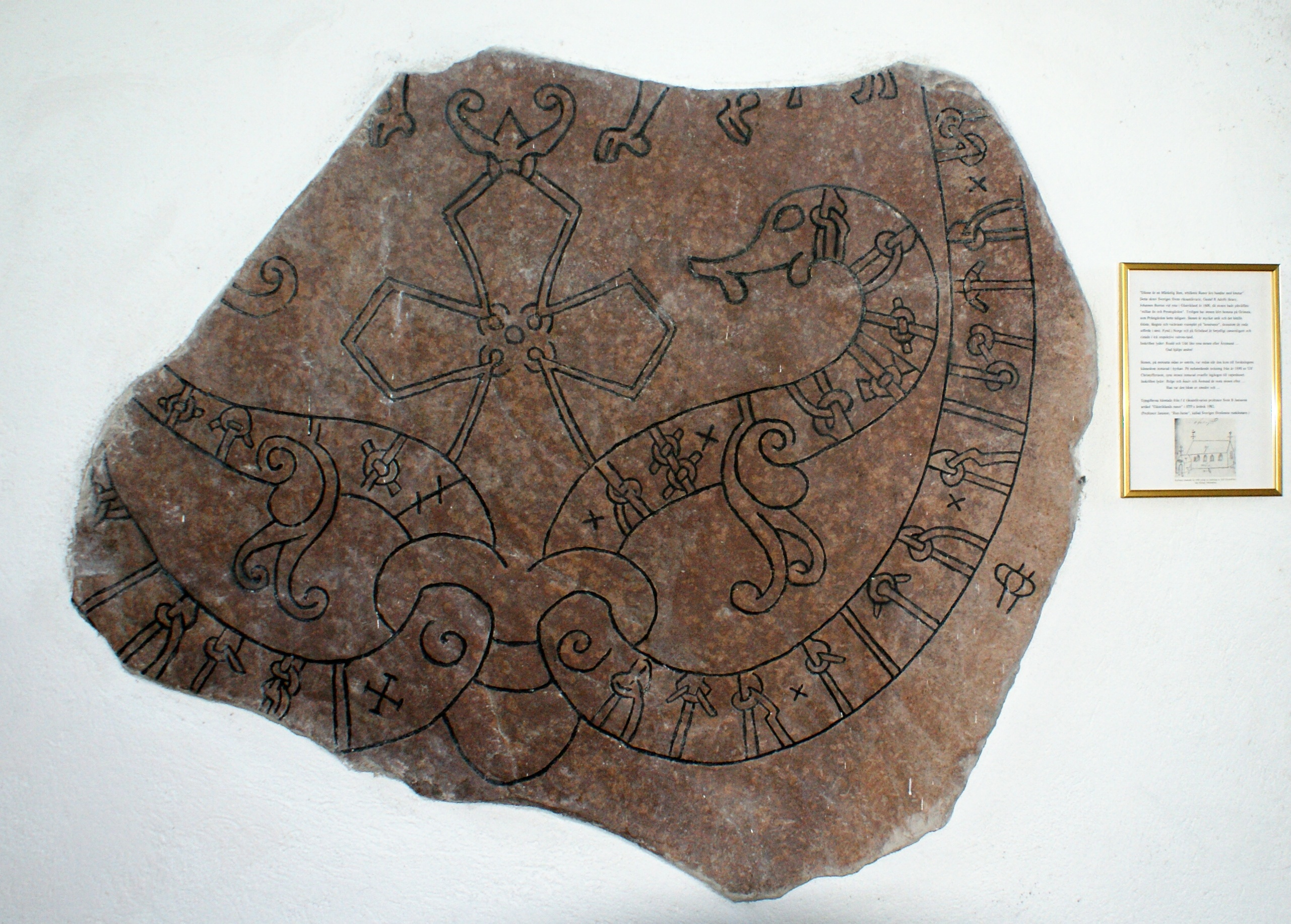 Runstensfragmentet Gs15 i Ovansjö kyrka.